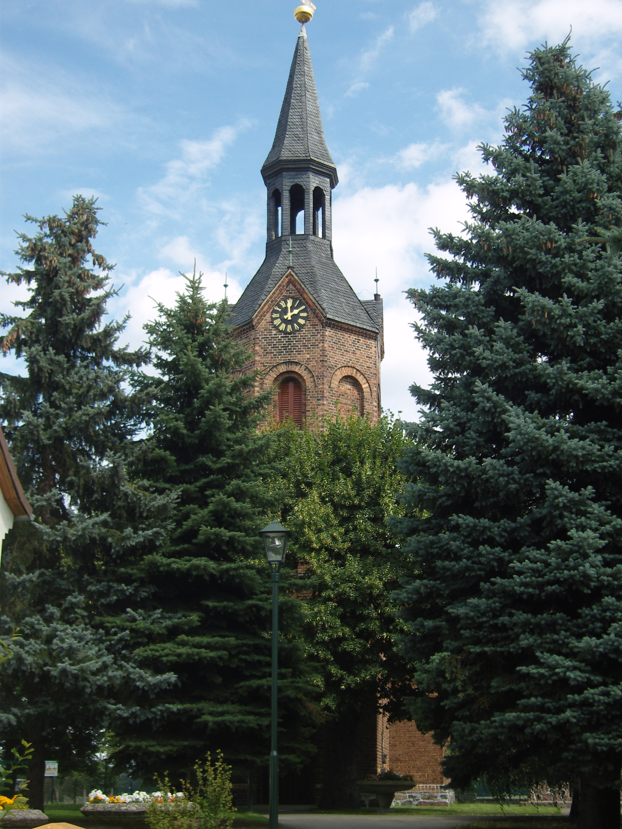 Dorfkirche in Saalhausen einem Ortsteil von Großräschen, die Kirche ist ein Baudenkmal